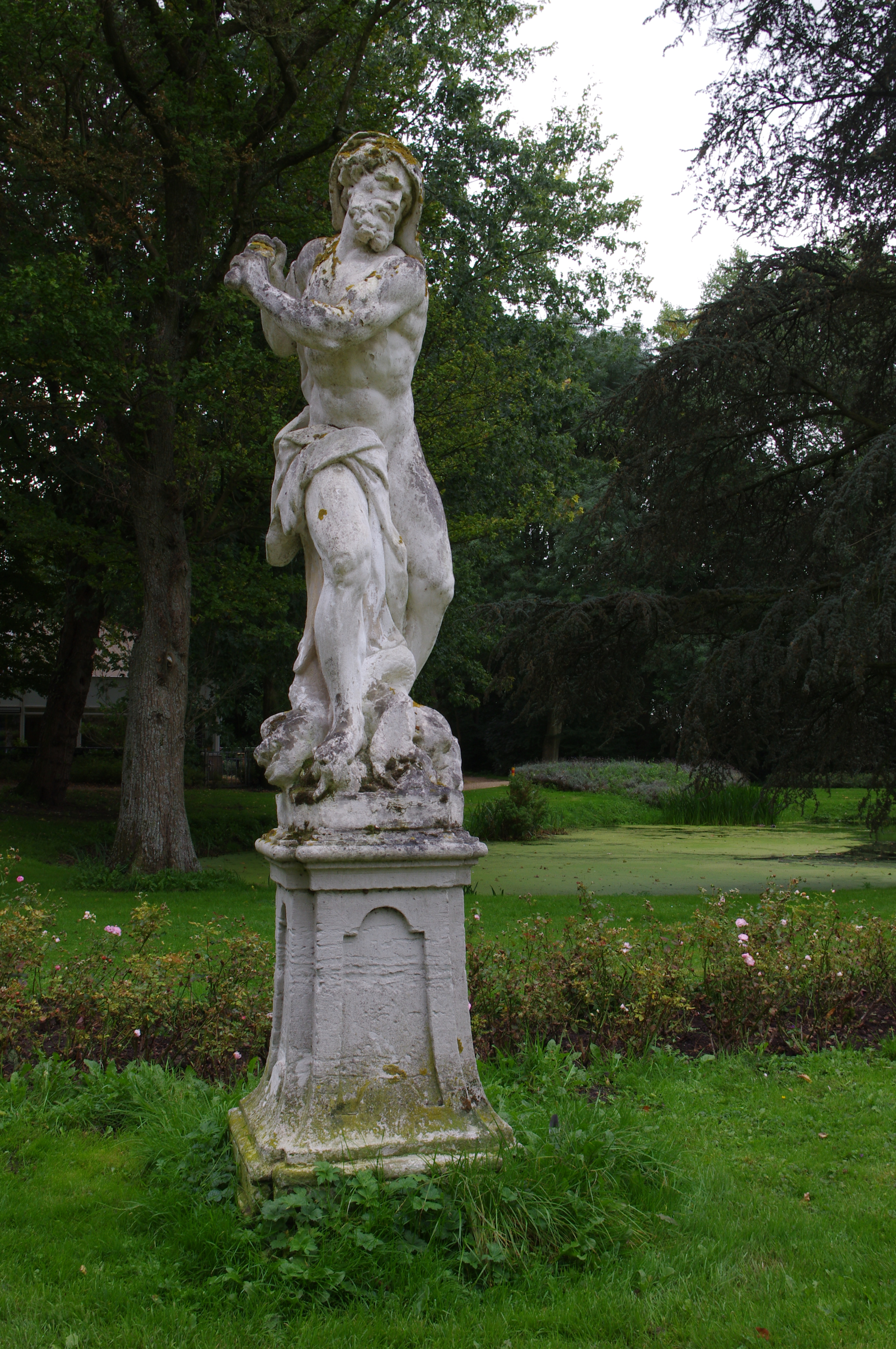 Tuinbeeld van Neptunus